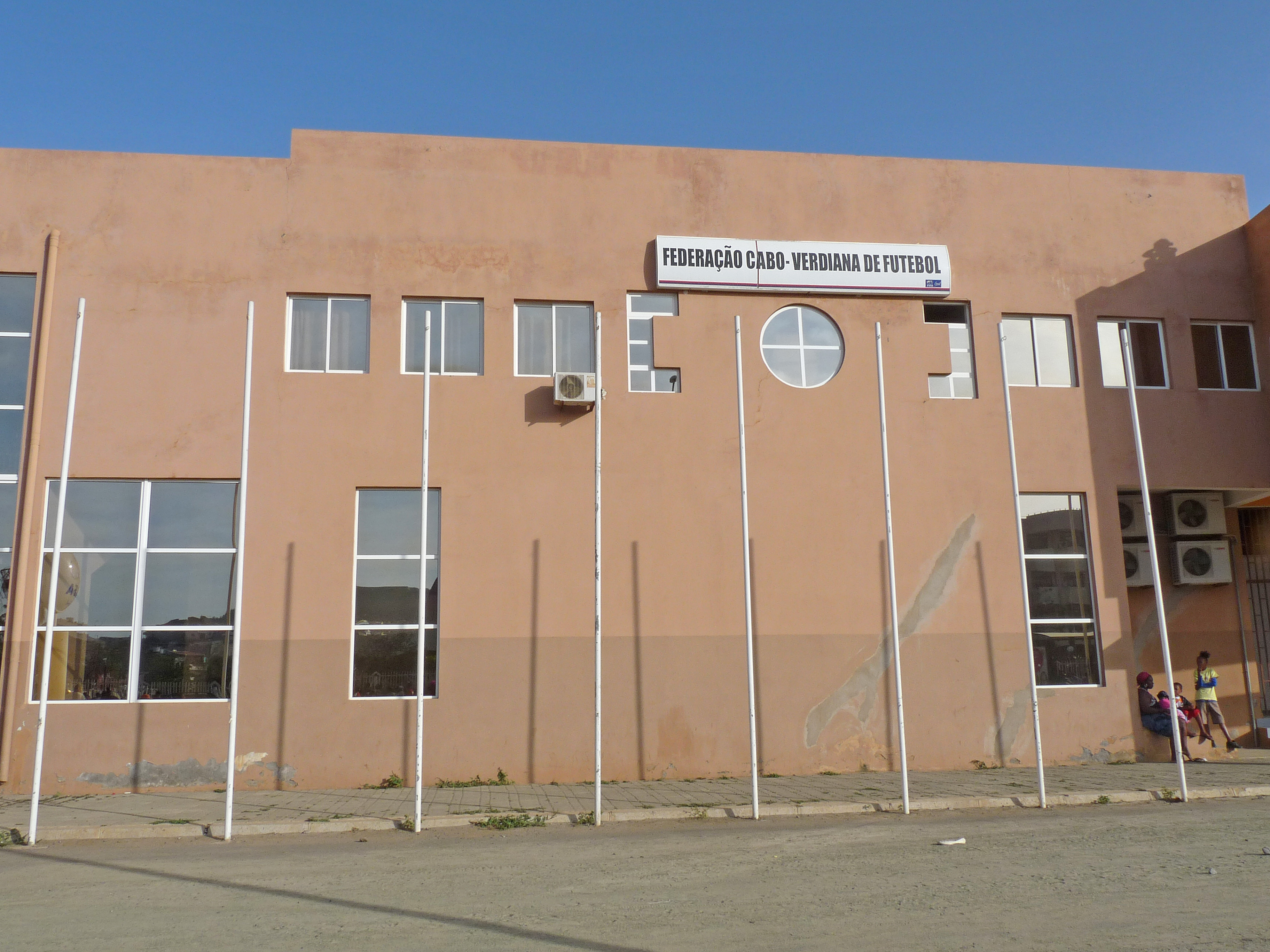 Praia (île de Santiago, Cap-Vert) : siège de la FCF (Federação Caboverdiana de Futebol)